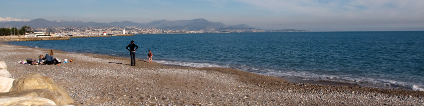 La Baie des Anges à Villeneuve-Loubet, PACA, France